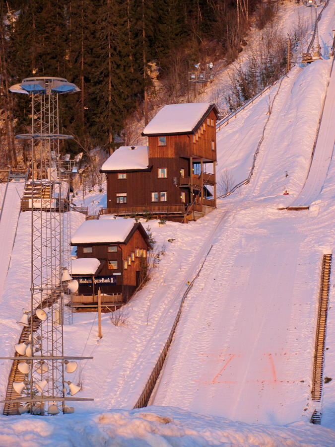 Dommertårnene mellem K25 og K45 i Vikersund Hoppsenter. Vikersund befinder sig i Modum kommune, Buskerud fylke, Norge